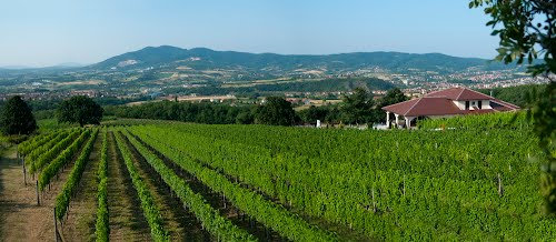 Vrbica vingård utanför Arandjelovac, Serbien